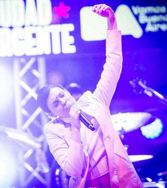 Victoria Bernardi presentandose en la 12° edición del “Festival Ciudad Emergente” en 2019.